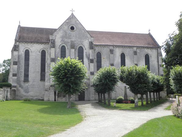 Église de St-Jean-aux-Bois (60)